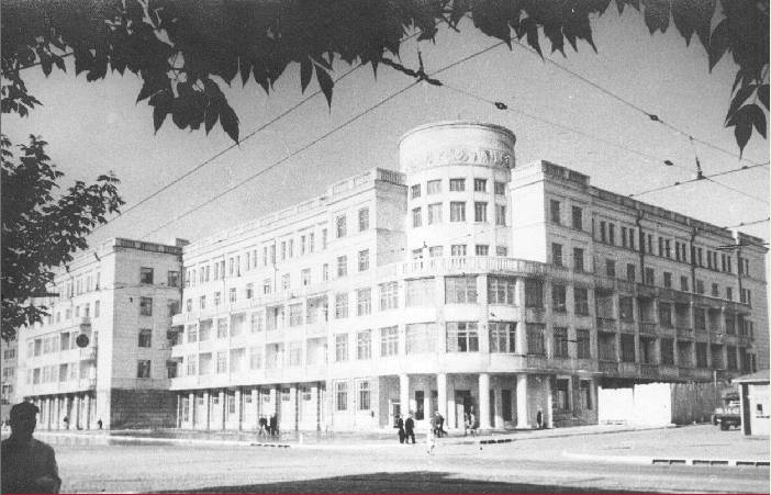 1938. Окончание строительства гостиницы Донбасс